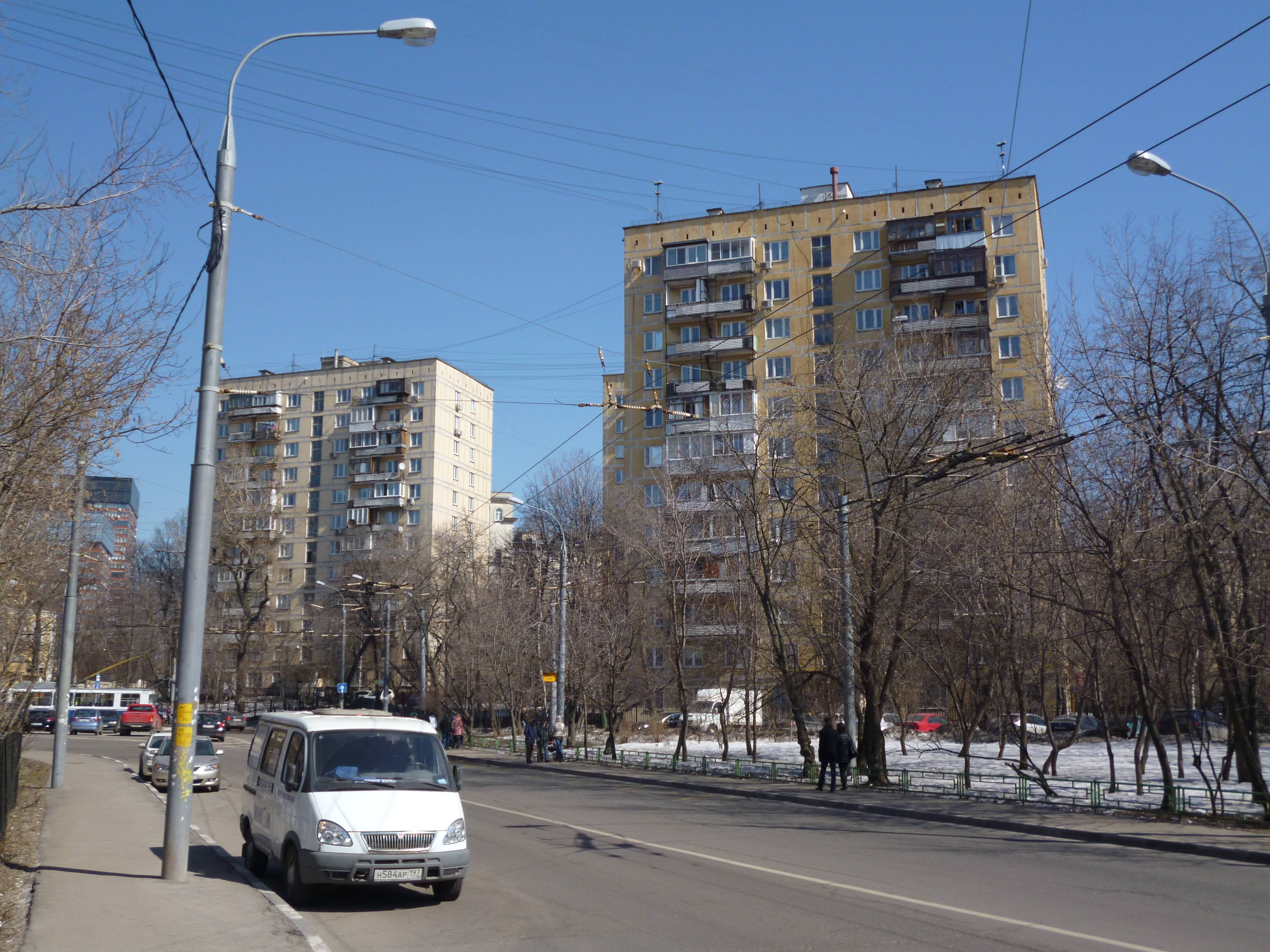 Жилые дома серии II-18/12 на Песчаной улице